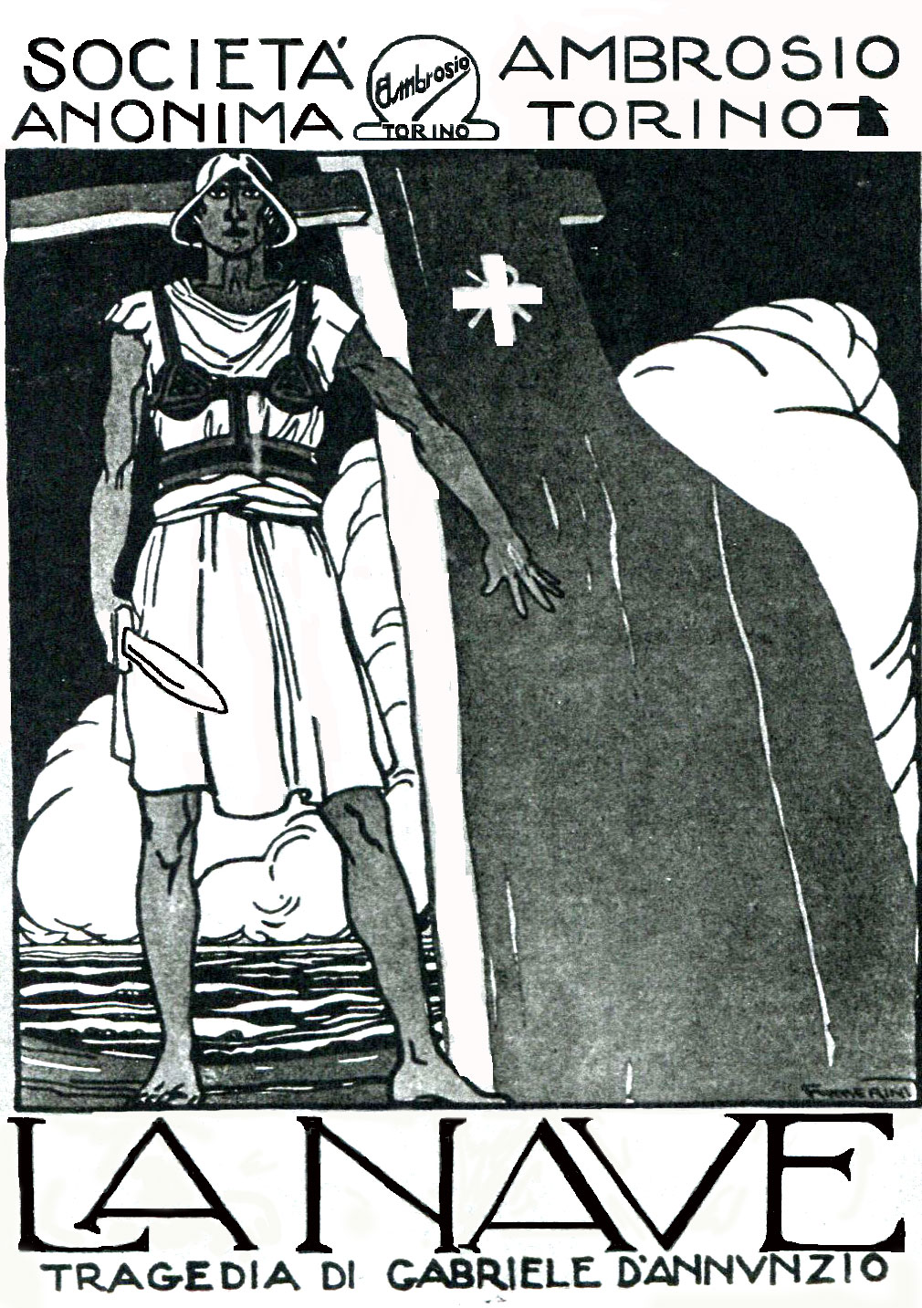 La nave (G. D'Annunzio, 1921) - promo dell'epoca